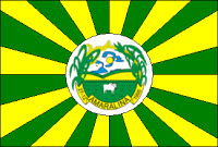 Bandeira de Amaralina, Goiás, Brasil.